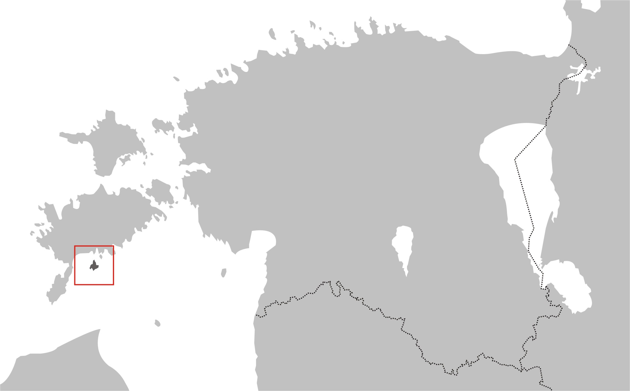 Lage der estnischen Insel Abruka (Abro)